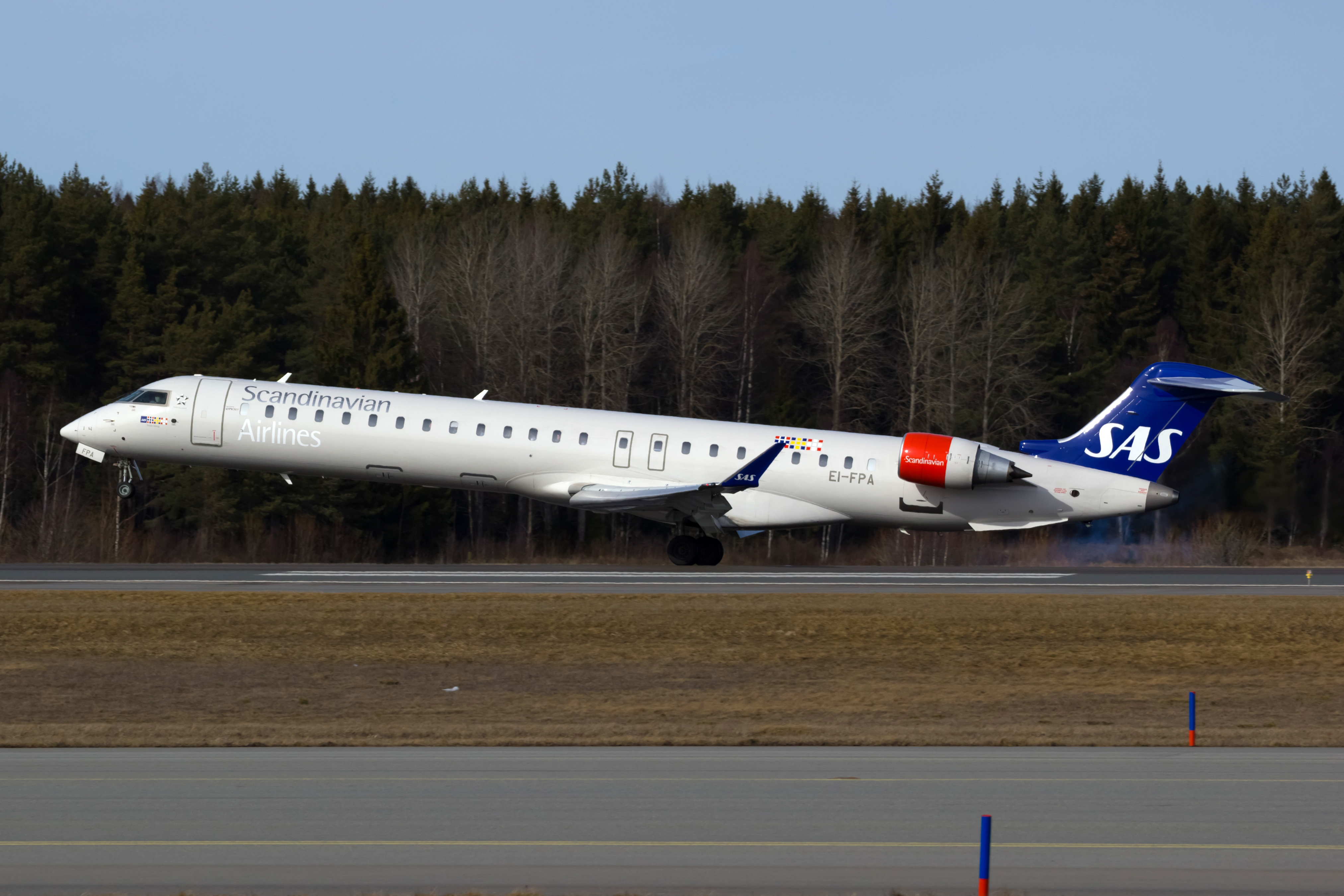 CRJ900 de SAS no aeroporto de Estocolmo-Arlanda.